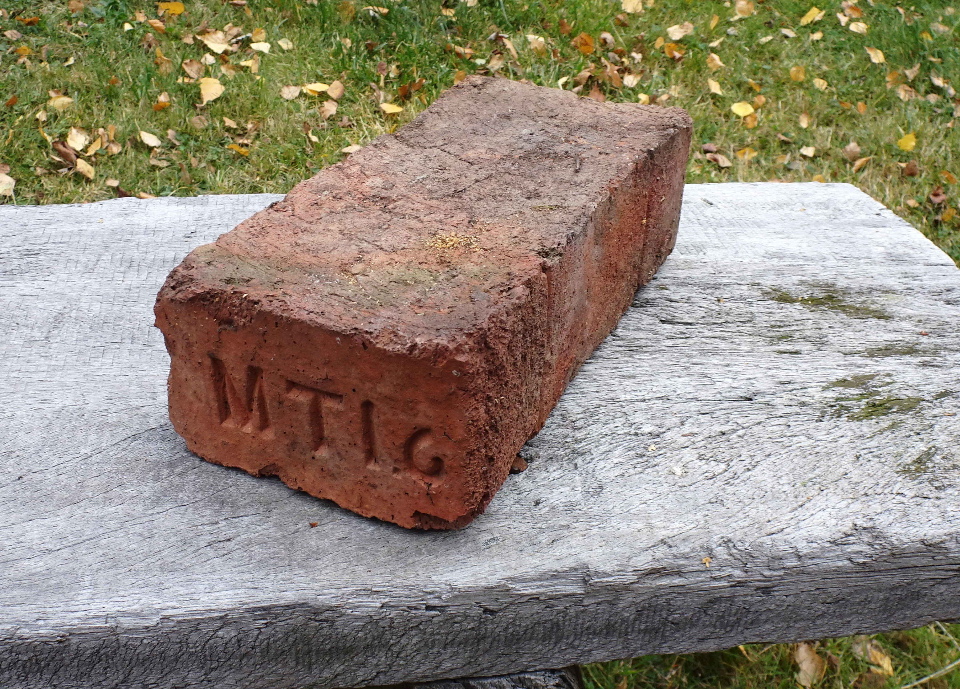 Lerviks tegelbruk, murtegel märkt "MT 1.6" (Mälardalens Tegelbruk) 1.6 är viktbeteckning för 1,41 - 1.60 volymvikt kg/kubikdecimeter)